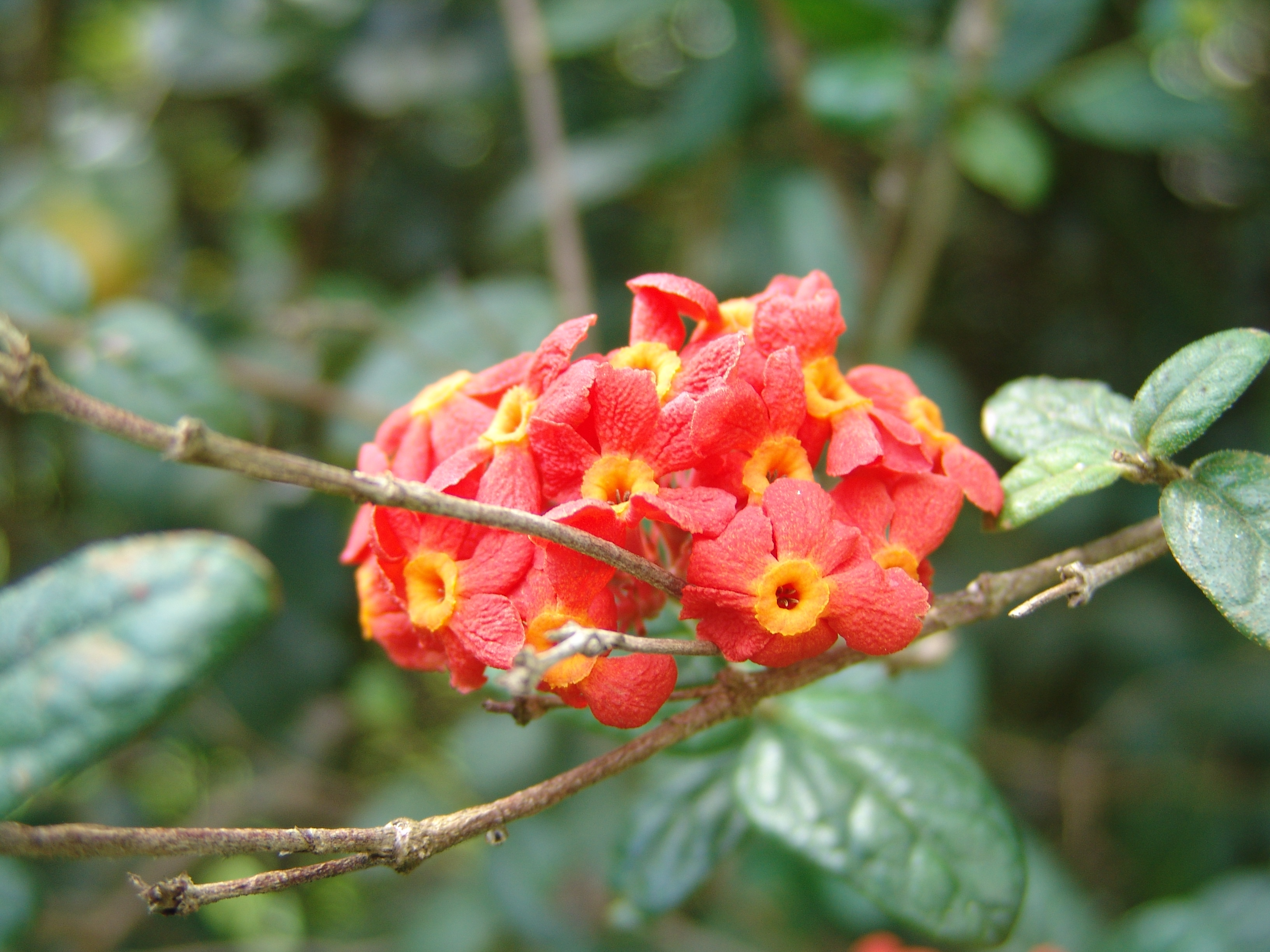 Ho'omaluhia Botanical Garden Oahu Hawaii